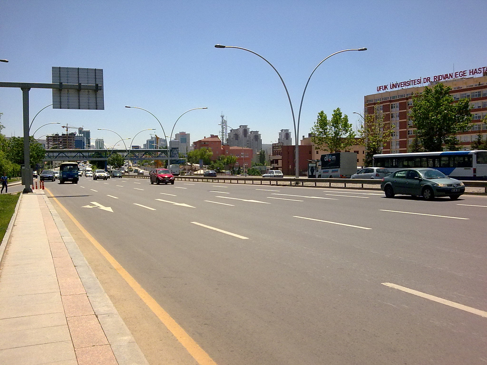 Konya Yolu, Ankara.